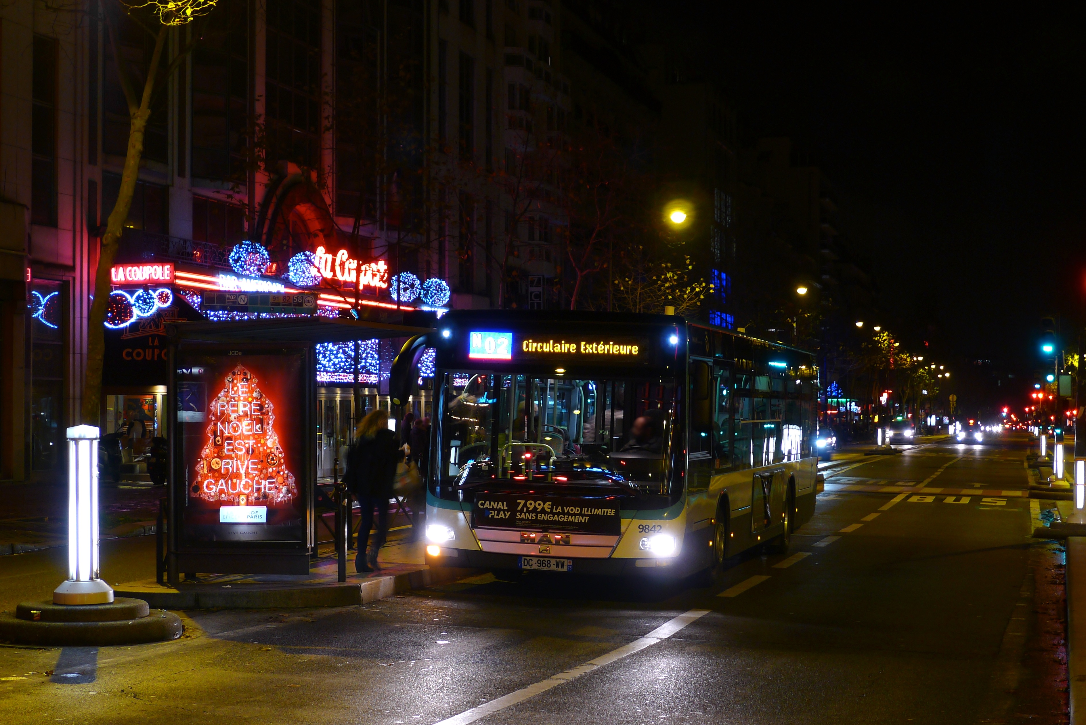 Man Lion's City NL255 RATP-STIF n°9842 sur le Noctilien N02 à Vavin.